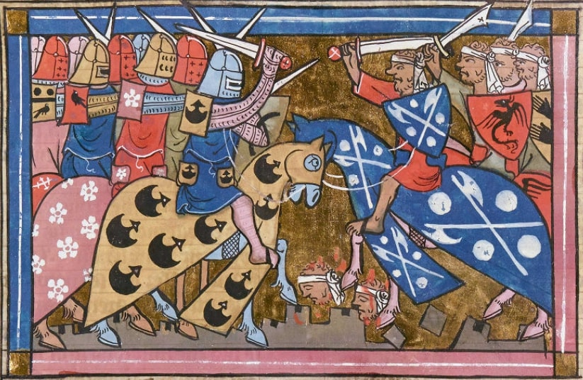 Cette miniature illustre l'un des combats de la deuxième croisade de Louis VII, venu à l'aide du roi de Jérusalem Baudoin III contre les Sarrasins, au milieu du XIIe siècle. - Guillaume de Tyr, Histoire d'Outremer, XIVe siècle, Paris, BnF, département des Manuscrits, Français 22495 fol. 154v.